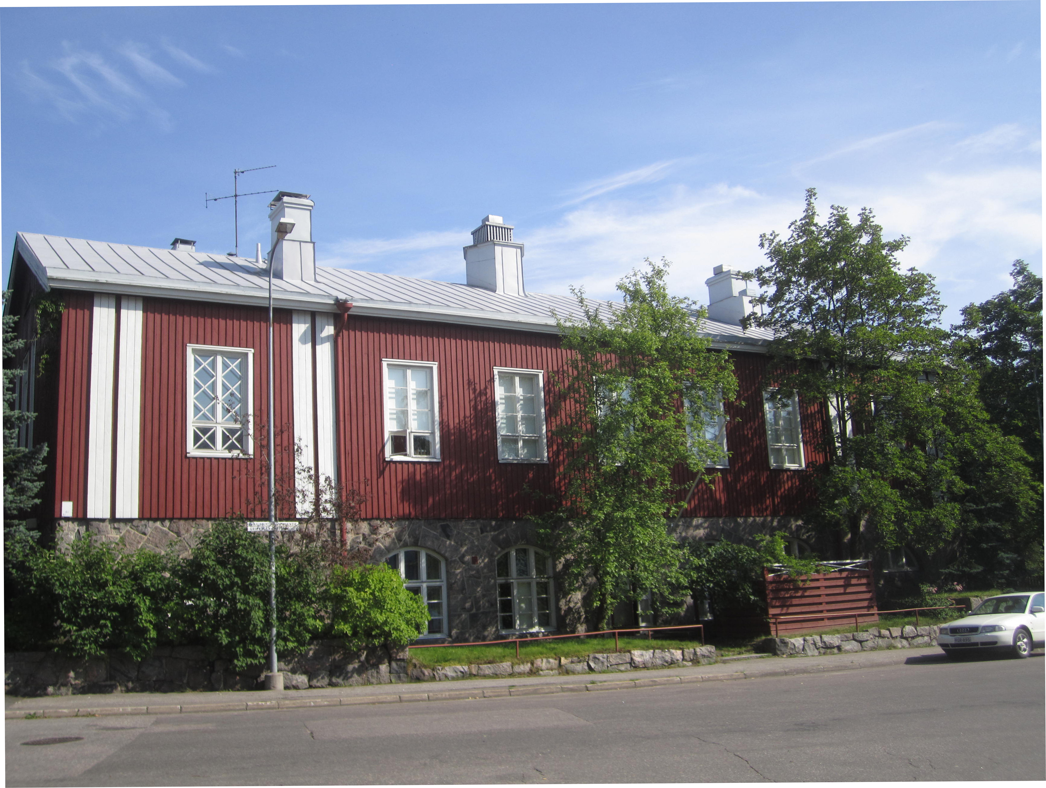 Käpylän työväentalo Helsingissä